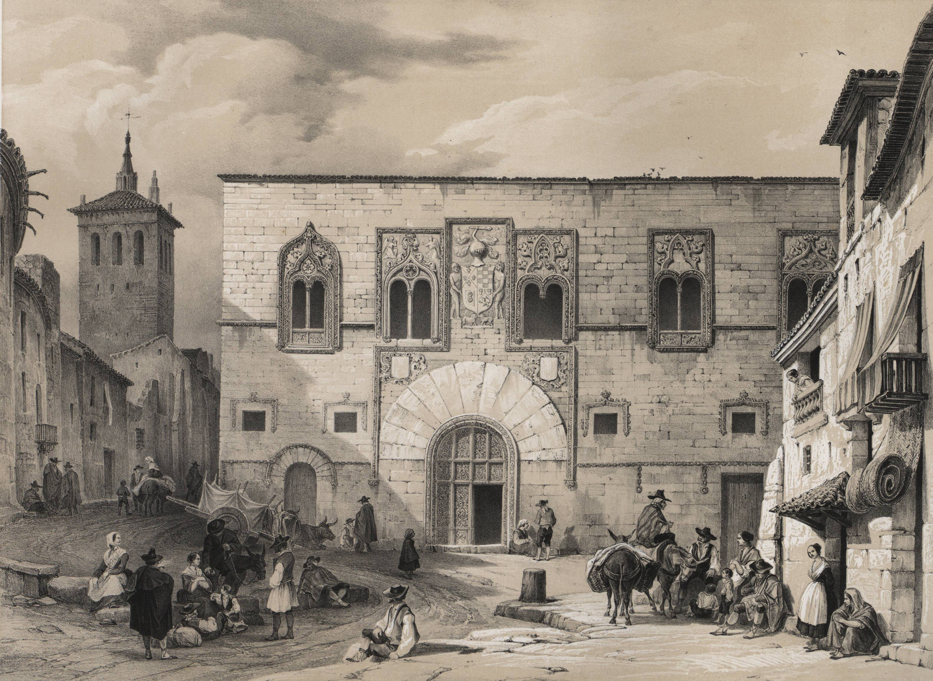 Plaza de los Momos en Zamora.